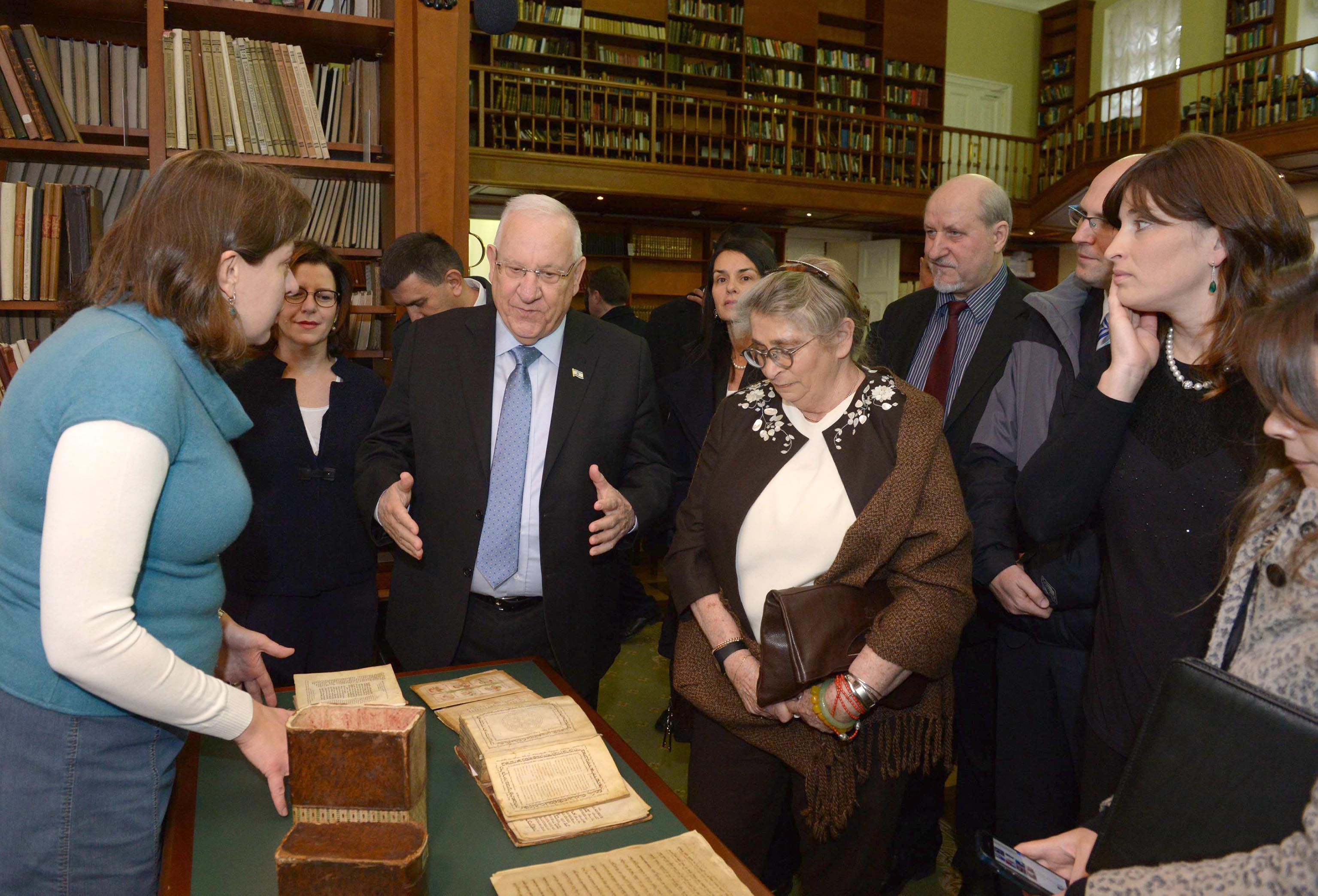 נשיא מדינת ישראל ראובן ריבלין בעת ביקור באוסף כתבי היד העבריים בספרייה הממלכתית של רוסיה